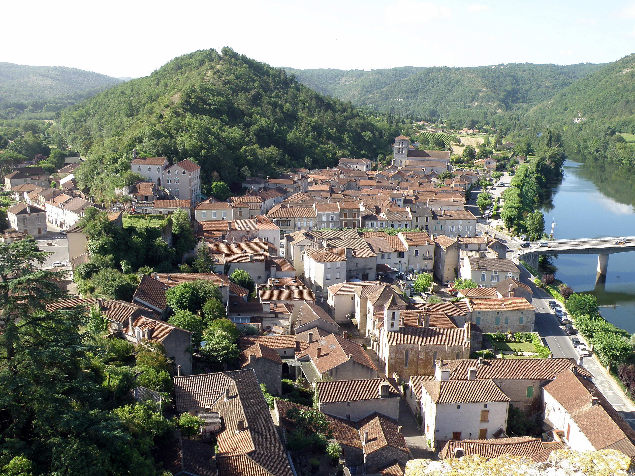 Luzech, ville dans le département du Lot, région Midi-Pyrénées, France. Vue générale de la ville prise depuis le sommet du donjon. Coup d’œil vers le sud. On remarque en bas à droite, la chapelle Saint-Jacques, dite des Pénitents bleus ; au fond à droite, église Saint-Pierre ; au fond, au centre gauche, montagne de la Pistoule ; contre le bord droit de la photo, les eaux de la rivière Lot.